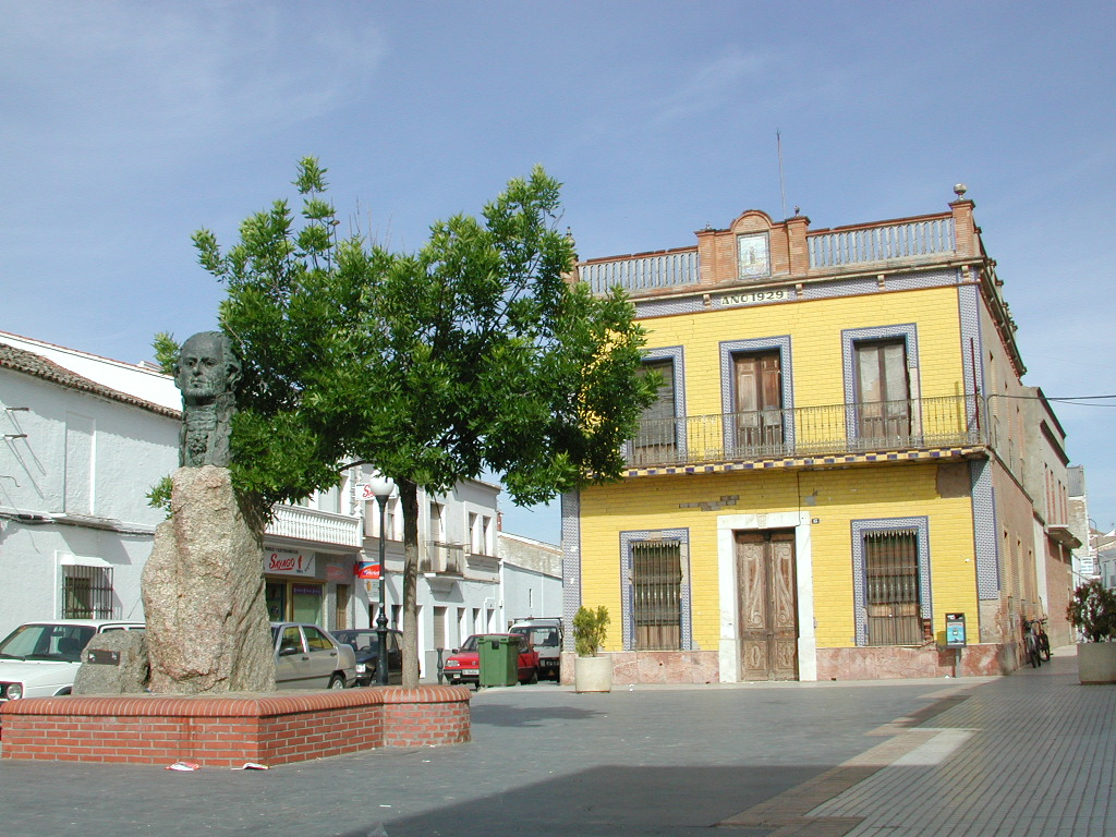 Monumento a Melendez Valdes